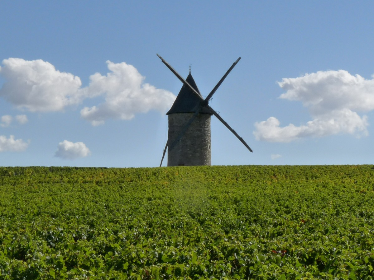 Moulin à vent de Blaignan, Gironde, France